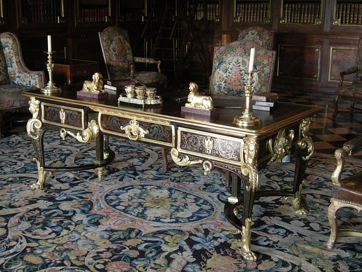 Bureau en ébène par André-Charles Boulle, femmes en bronze doré dans les angles (Château de Vaux-le-Vicomte)